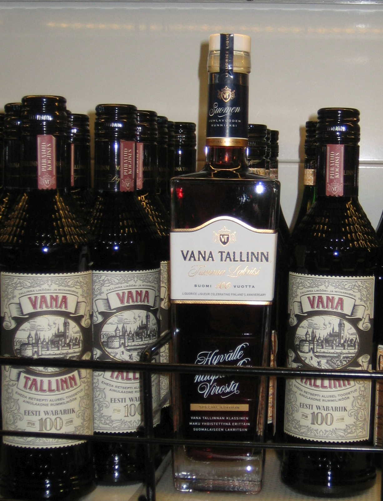 Liköör "Vana Tallinn" Soome Vabariigi 100. aastapäevaks ja Eesti Vabariigi 100. aastapäevaks